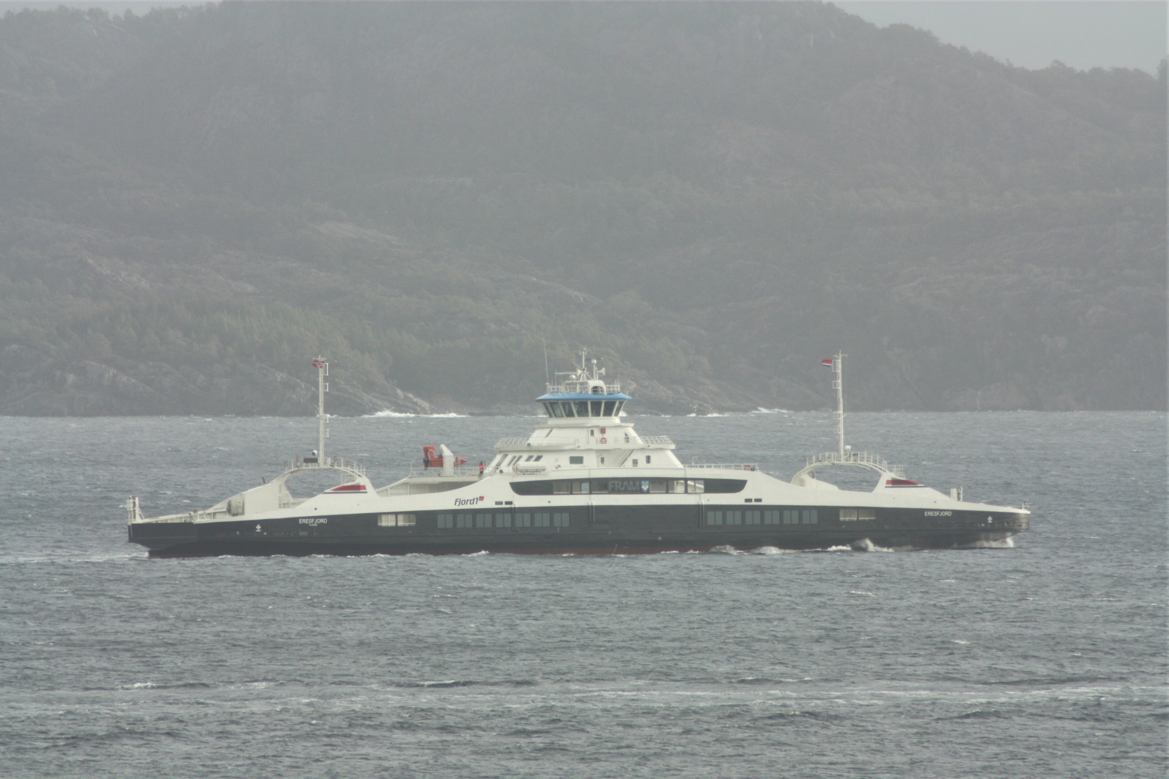 «Eresfjord» i Korsfjorden